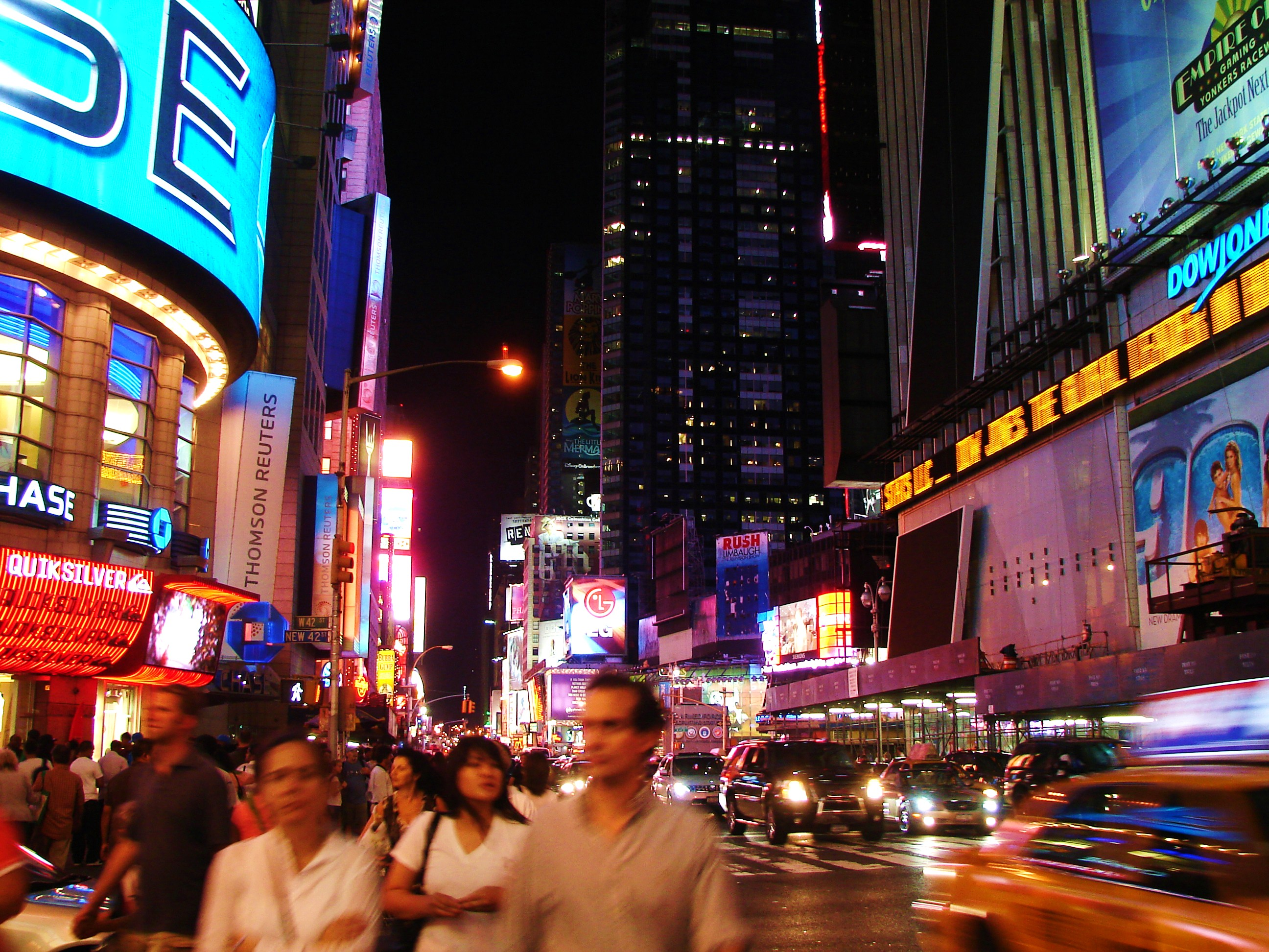 ന്യൂയോർക്ക് നഗരത്തിന്റെ രാത്രി ദൃശ്യം. ടൈംസ് സ്ക്വയർ പരിസരത്തു നിന്ന�